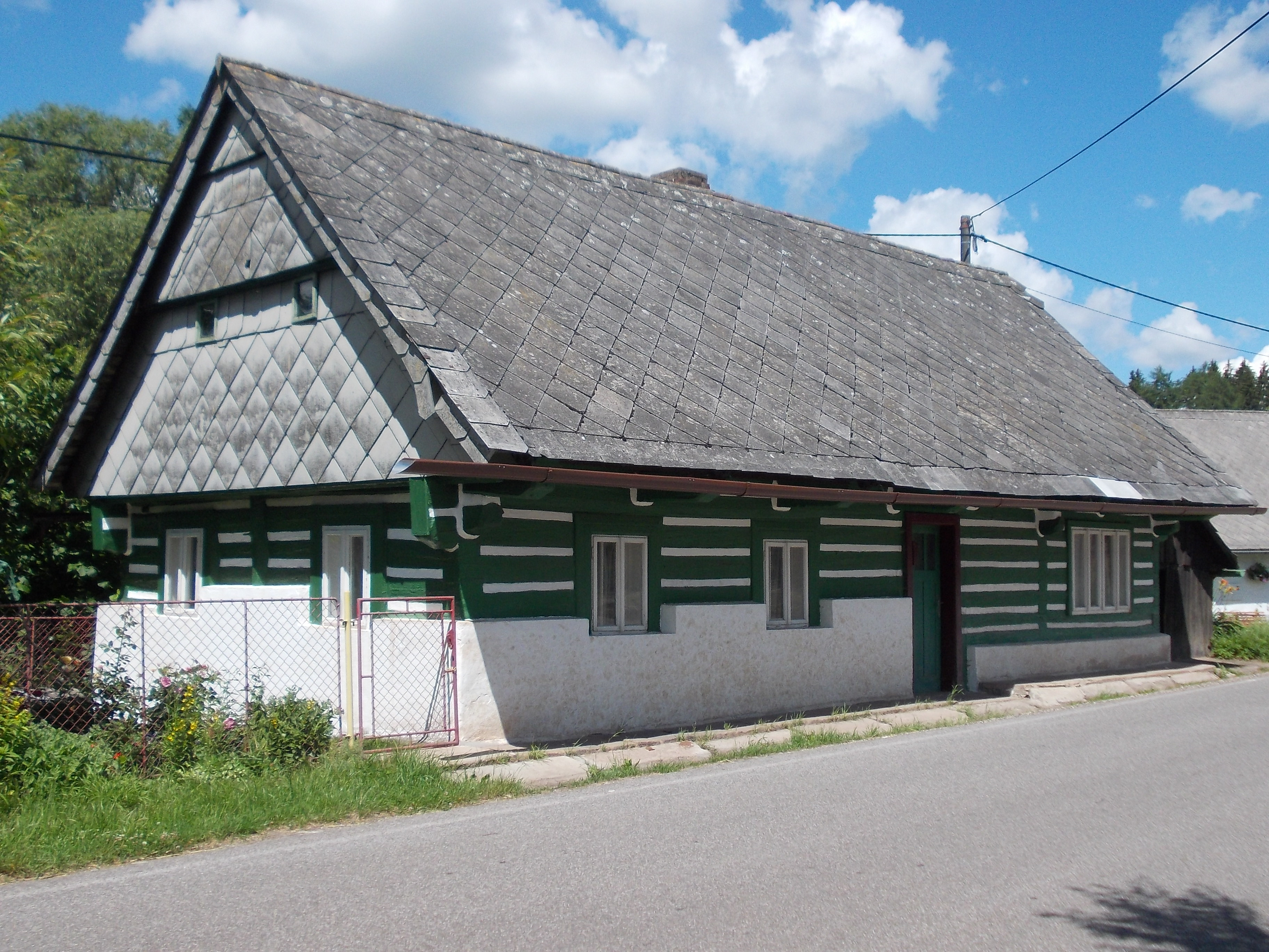 Levínská Olešnice - dům č.p. 24